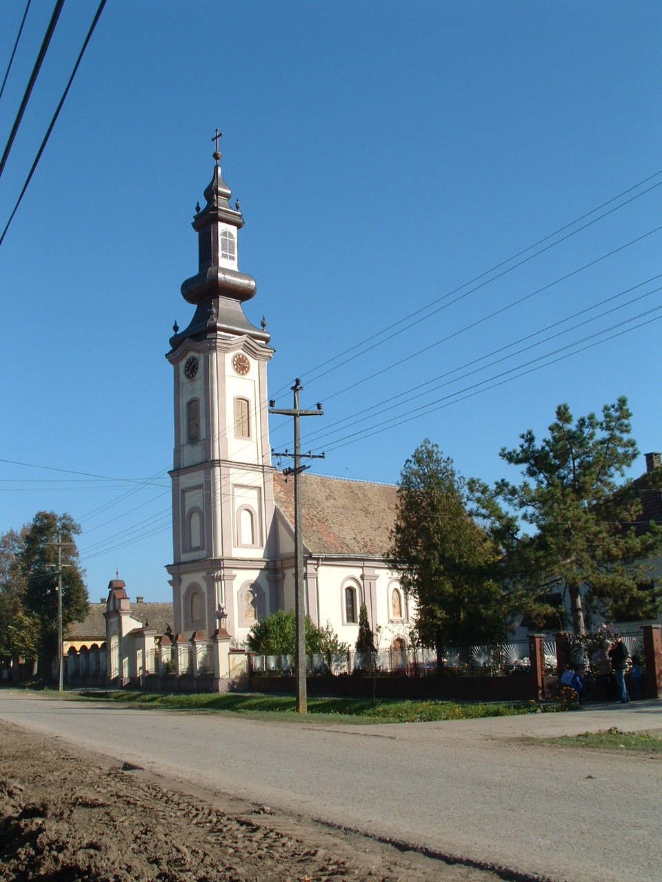 Кузмин - Православна црква